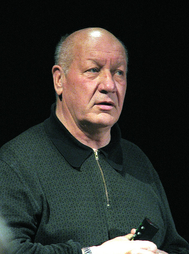 Fred Jüssi